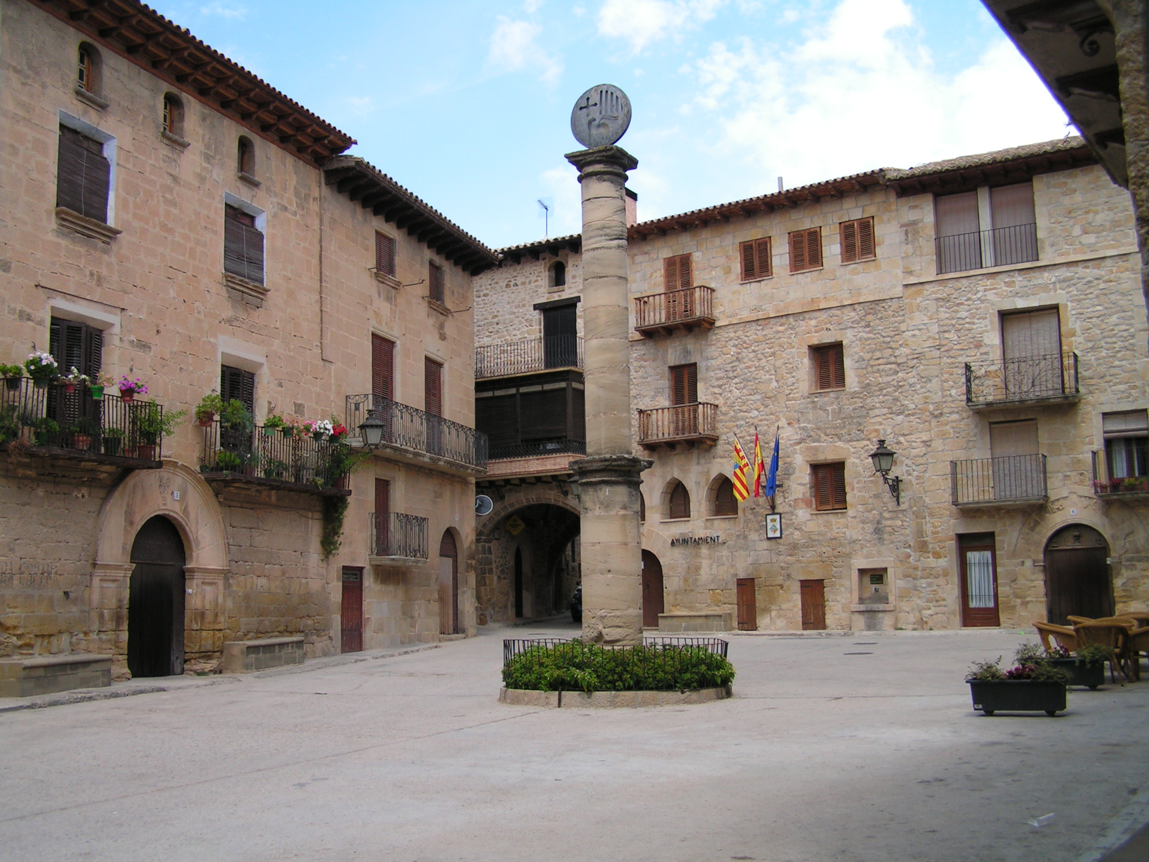 Ajuntament de Cretes